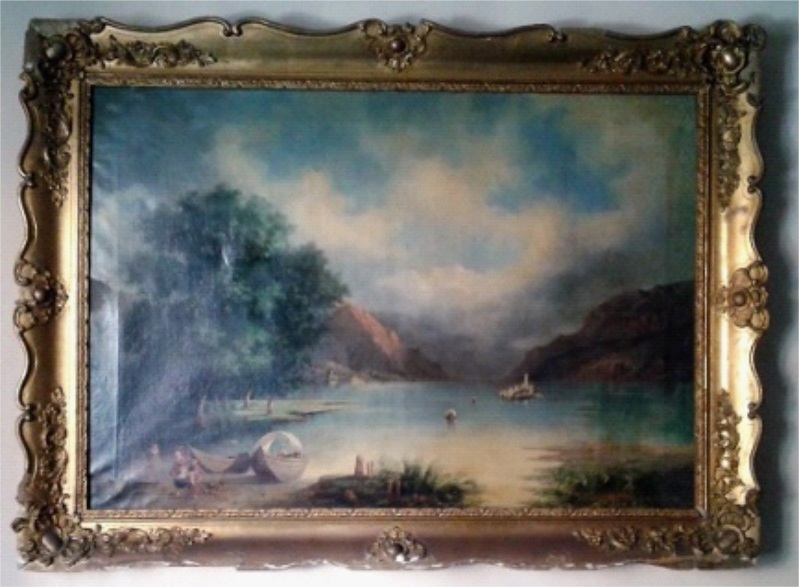 Francesco Gamba olio su tela cm 92 x 128 1845 veduta isola dei pescatori Lago Maggiore